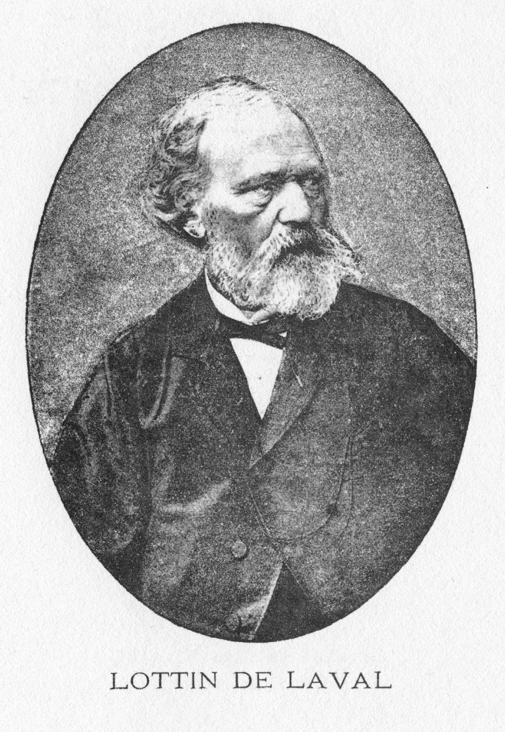 photographie en noir et blanc de Pierre Victor Lottin de Laval (1810-1903)